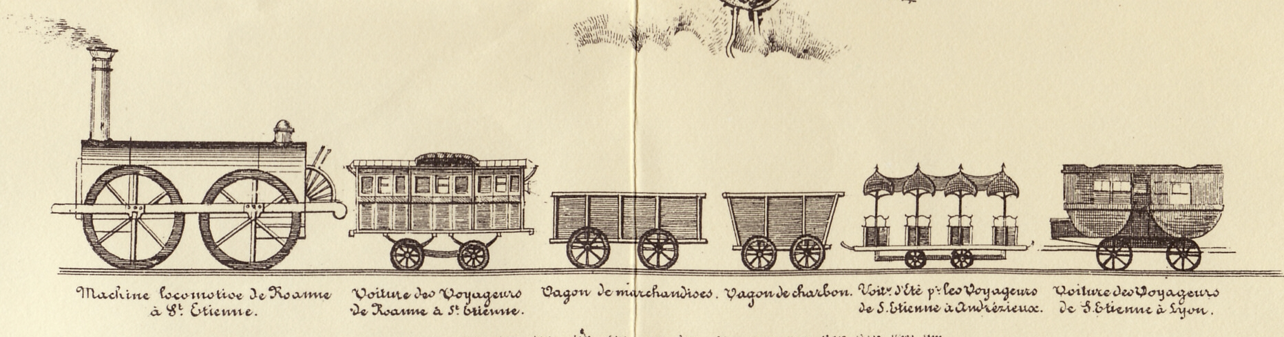 Chemins de fer de la Loire (vue partielle d'une lithographie)